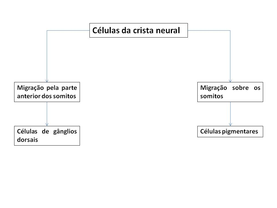 Esquema simplificado de migração de células da crista neural em um embrião de galinha.